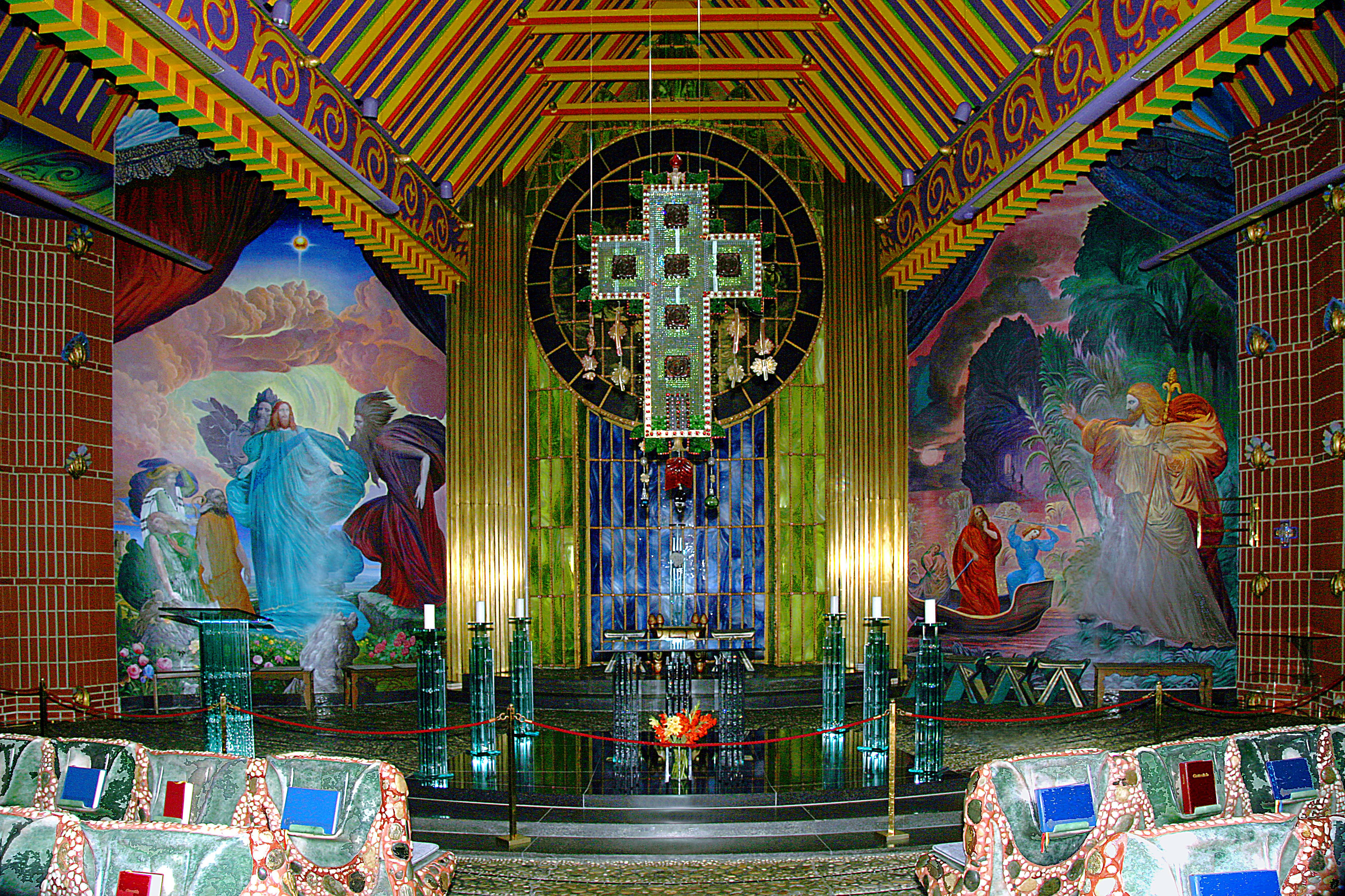 Pfarrkirche St.Jakob in Thal bei Graz, Österreich, Innenansicht